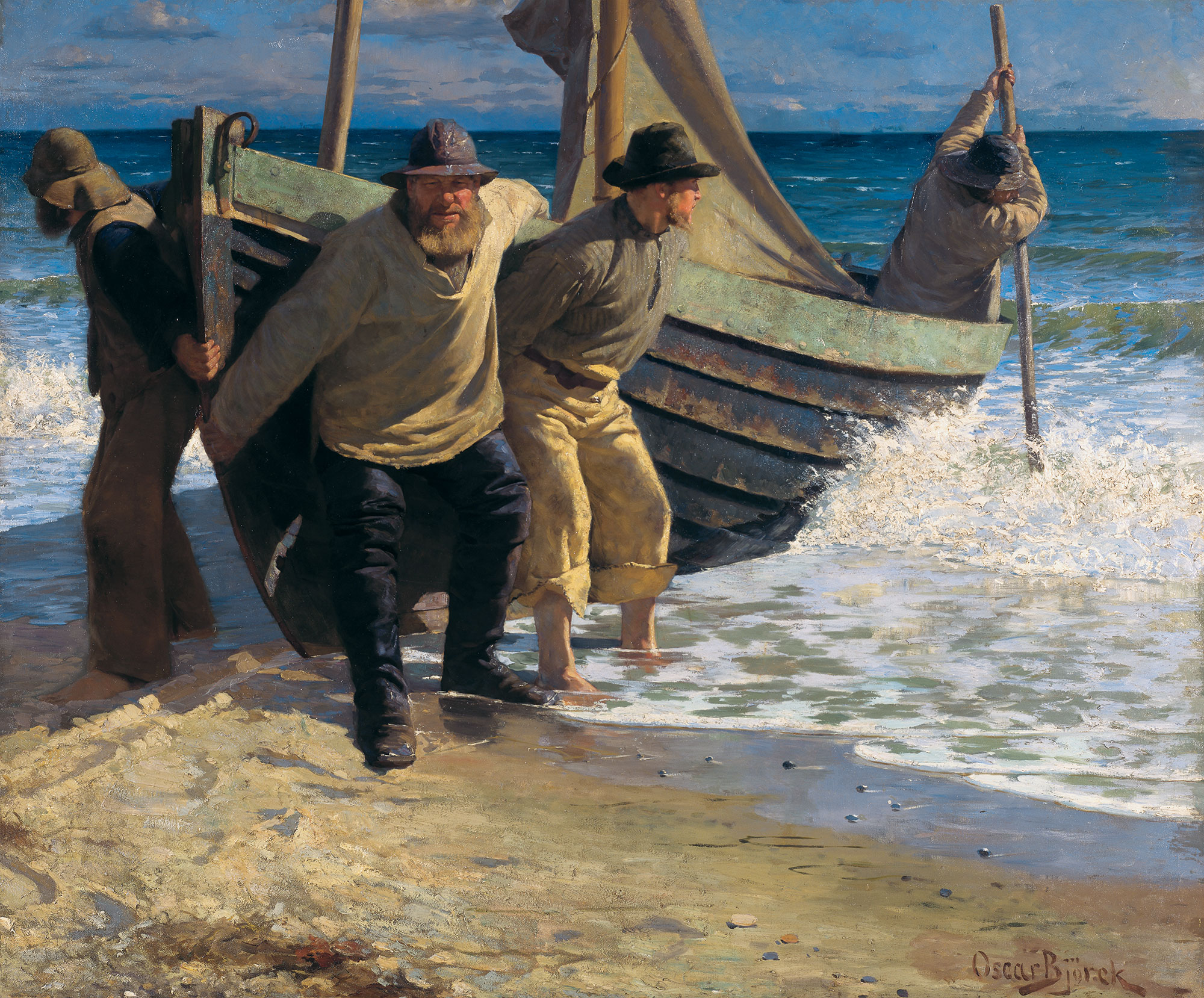 painted at Skagen in Denmark